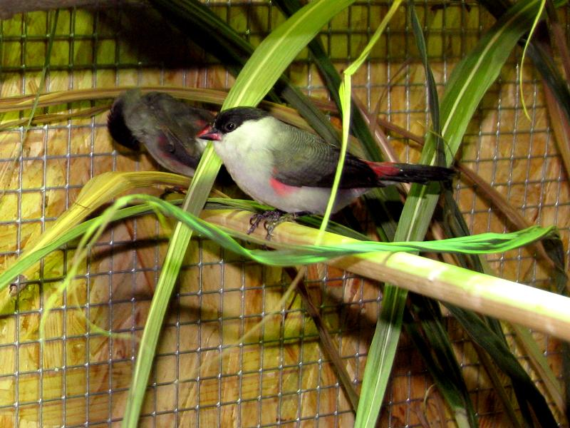 Nonnenastrild (Estrilda nonnula) Foto: 2011